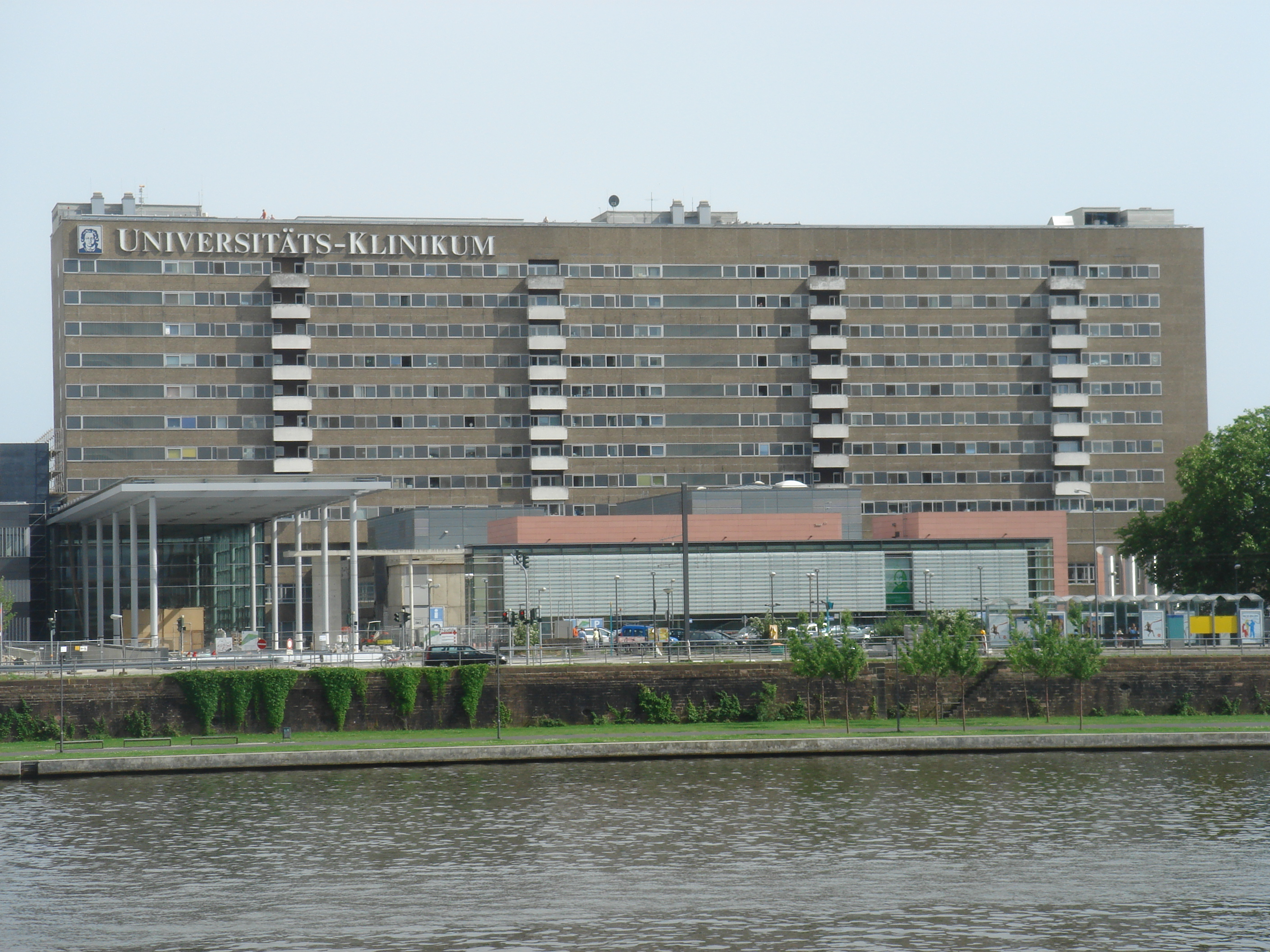 Universitätsklinikum Frankfurt am Main, Zentralbau, Haus 23 (1972)